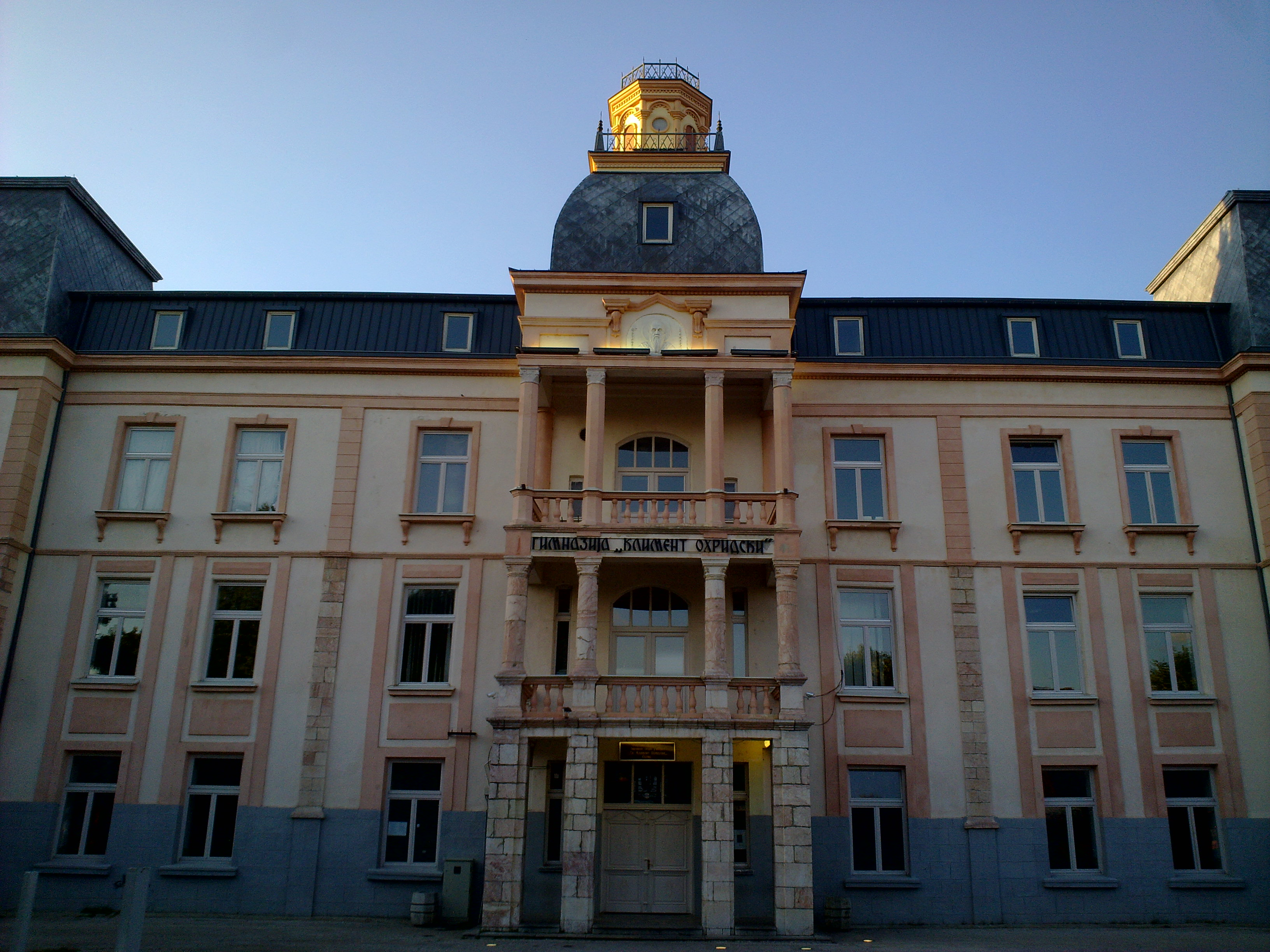 030720115456 Ohrid